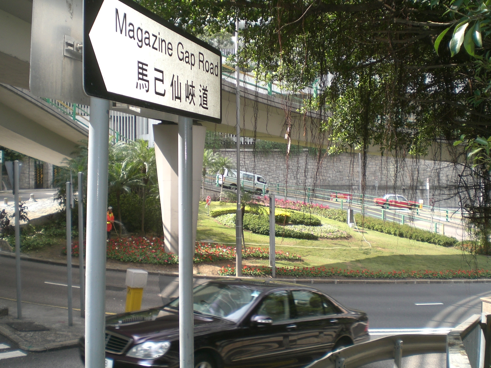 馬己仙峽道近花園道55號愛都大廈